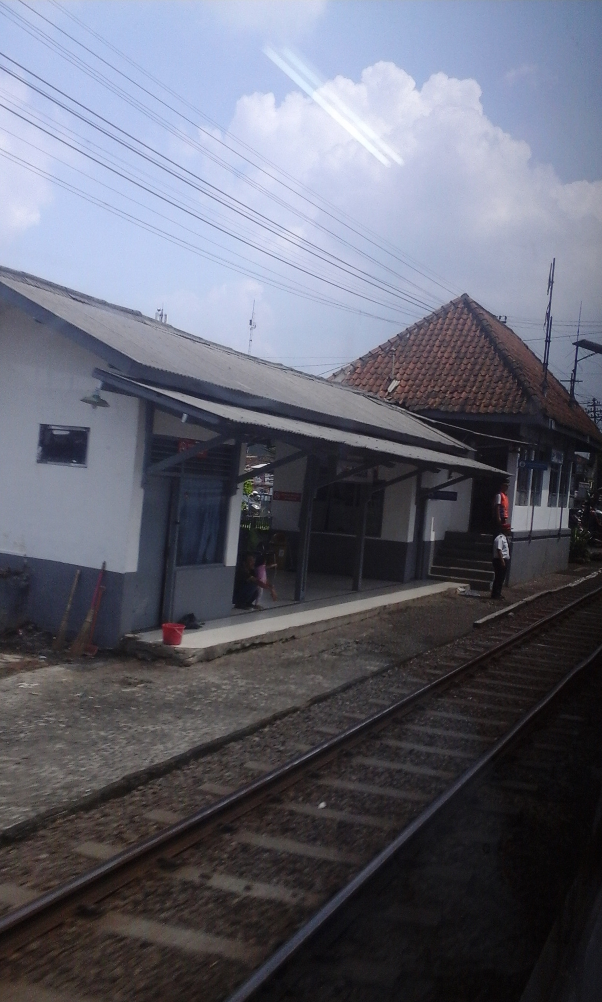 Stasiun Andir